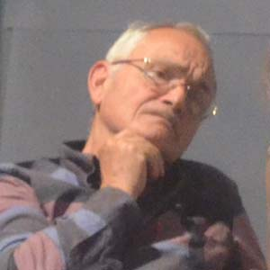 Ánchel Conte, écrivain aragonais, à Saint-Lary, France, mai 2012